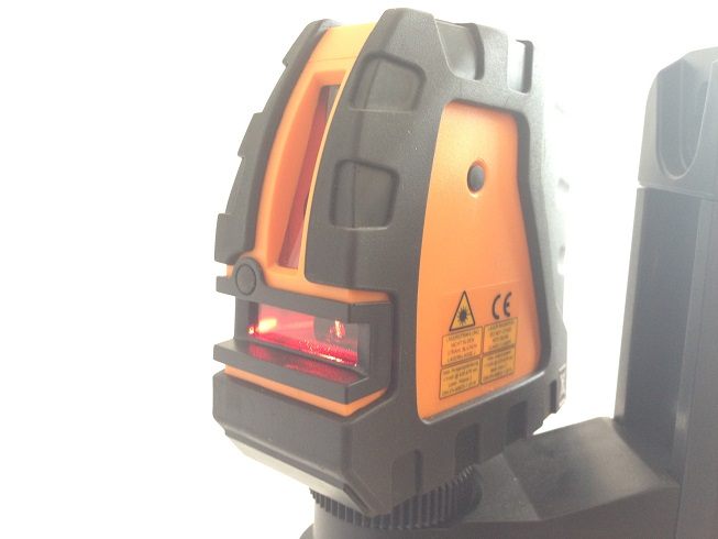 Lazerinis gulsčiukas